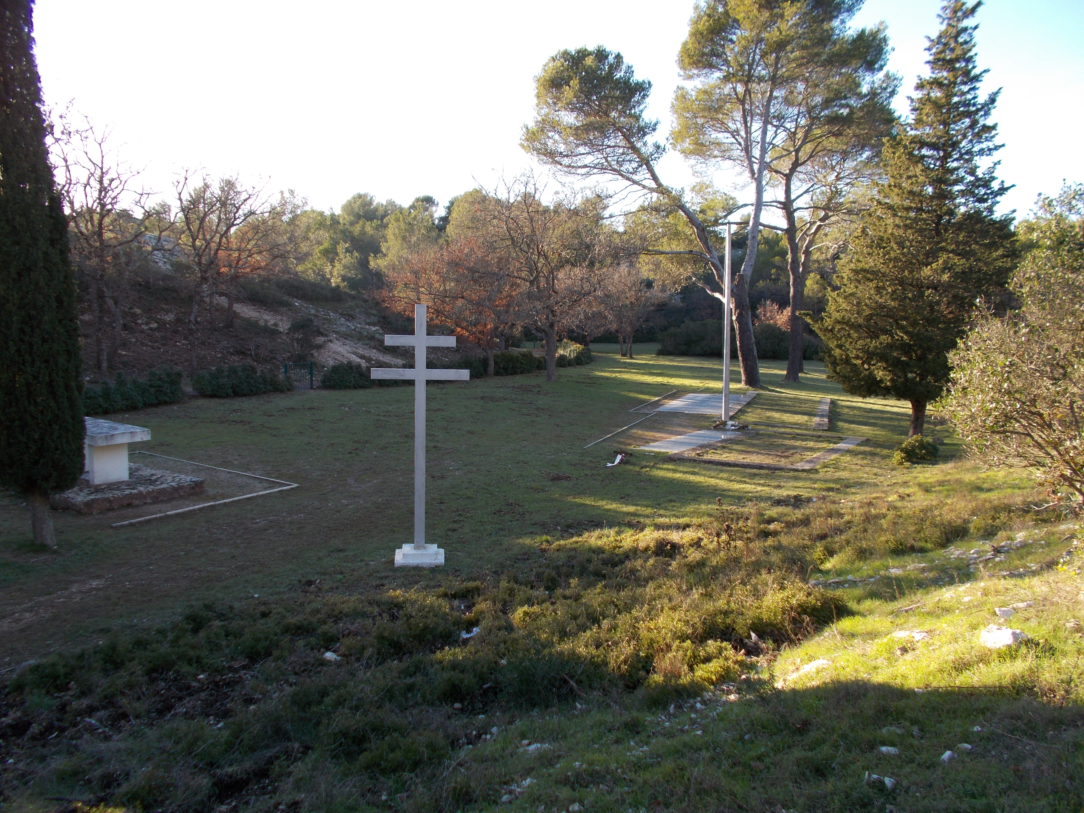 Lieu situé sur la commune de Signes dans le Var où 38 résistants furent fusillés par les troupes allemandes d'occupation les 18 juillet et 12 août 1944.